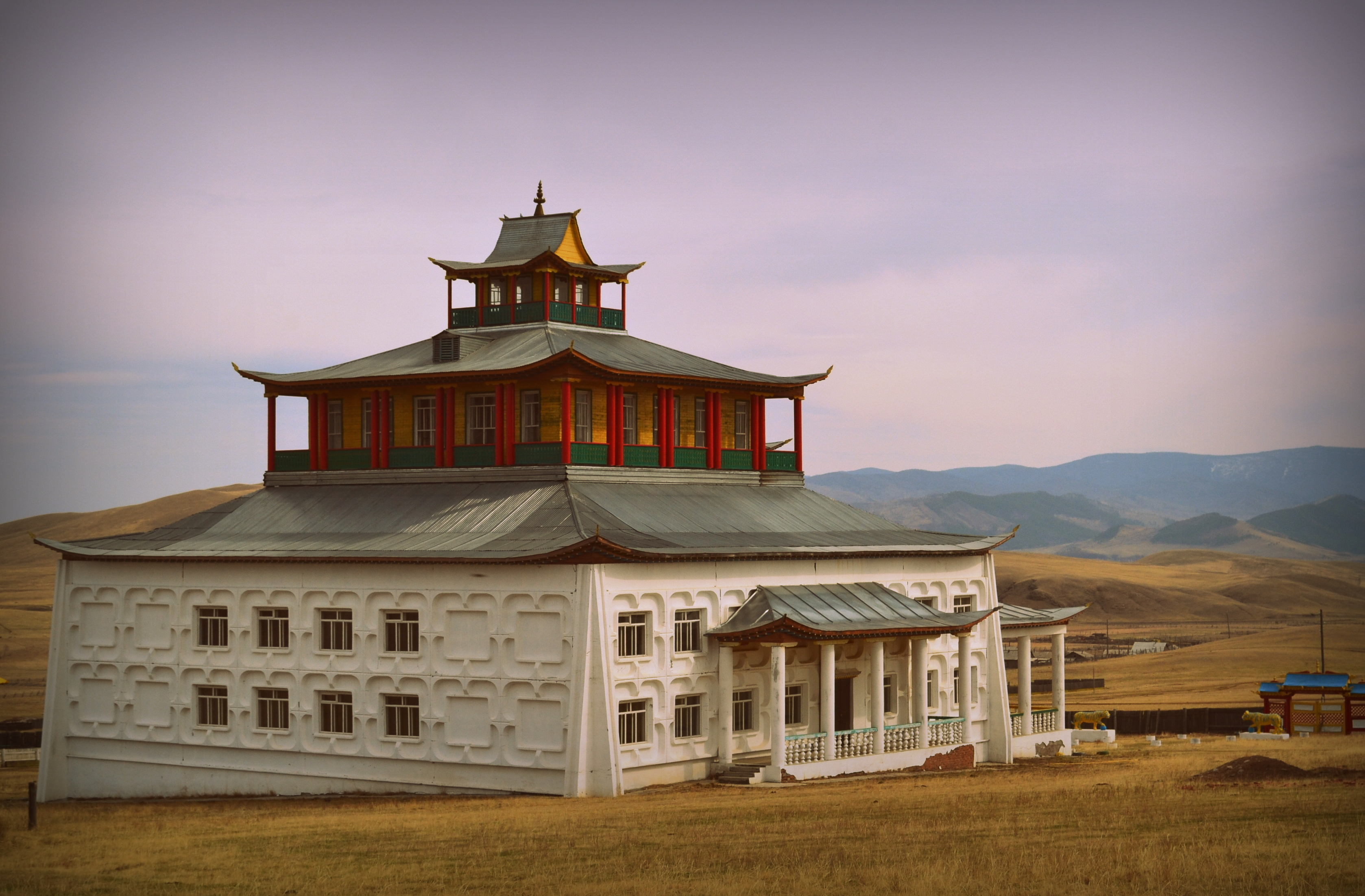 Сартул-Гэгэтуйский дацан. Бурятия, Джидинский район, село Гэгэтуй